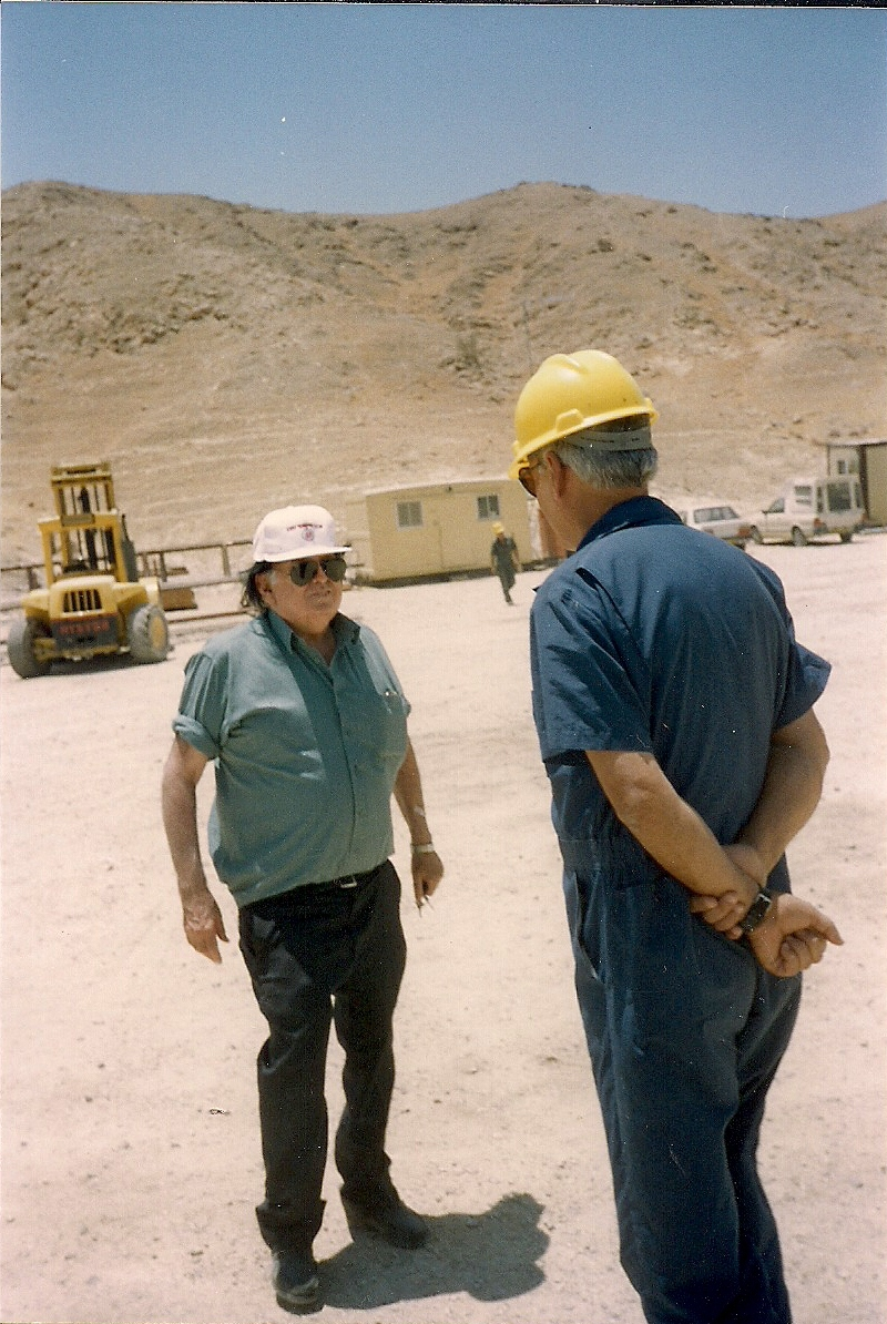 אלי רוזנברג הוא גיאולוג ויזם ויועץ בתחום קידוחי גז מסחריים בישראל, בים התיכון ובעולם.